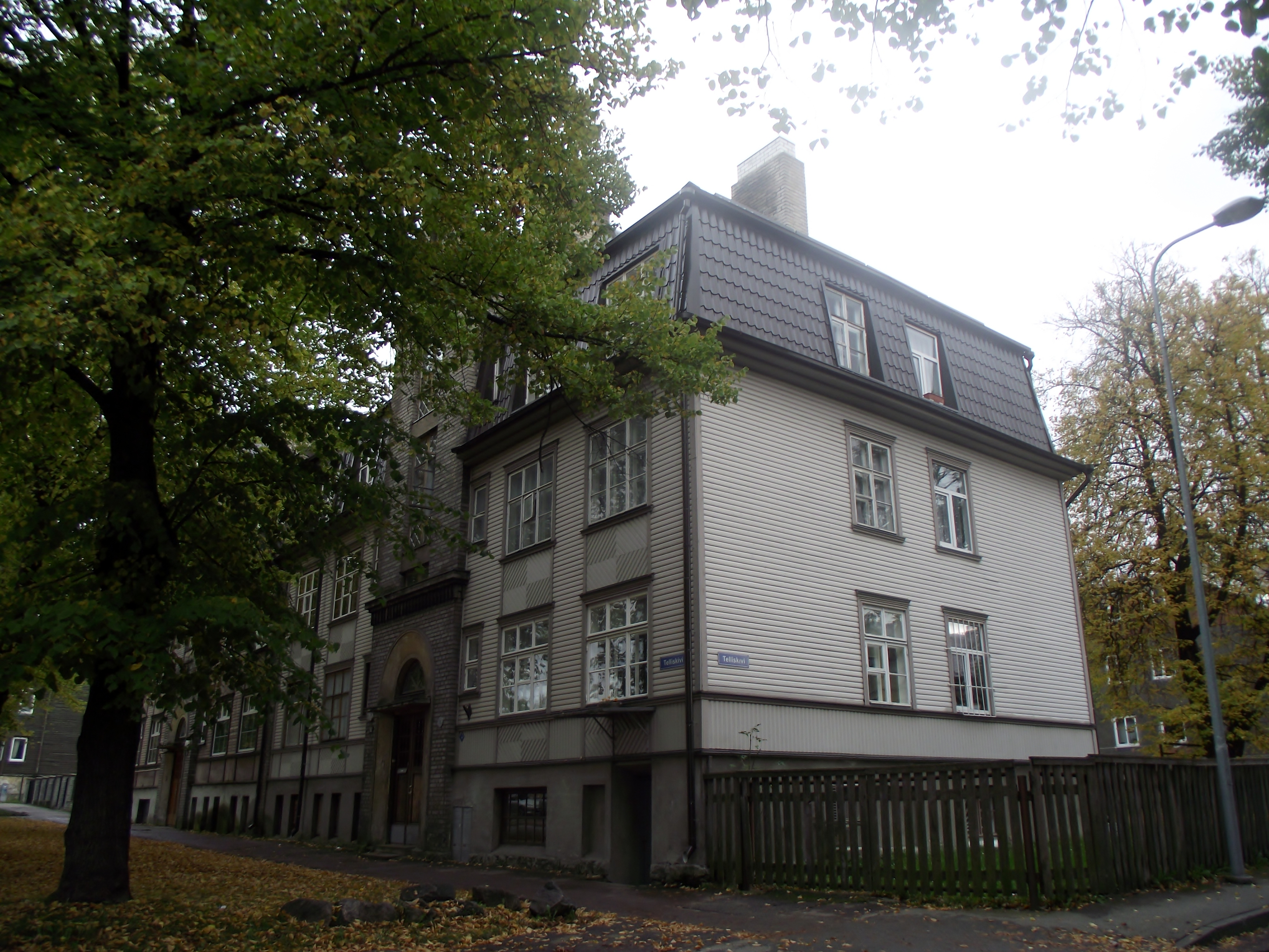 Telliskivi 52 Tallinnas